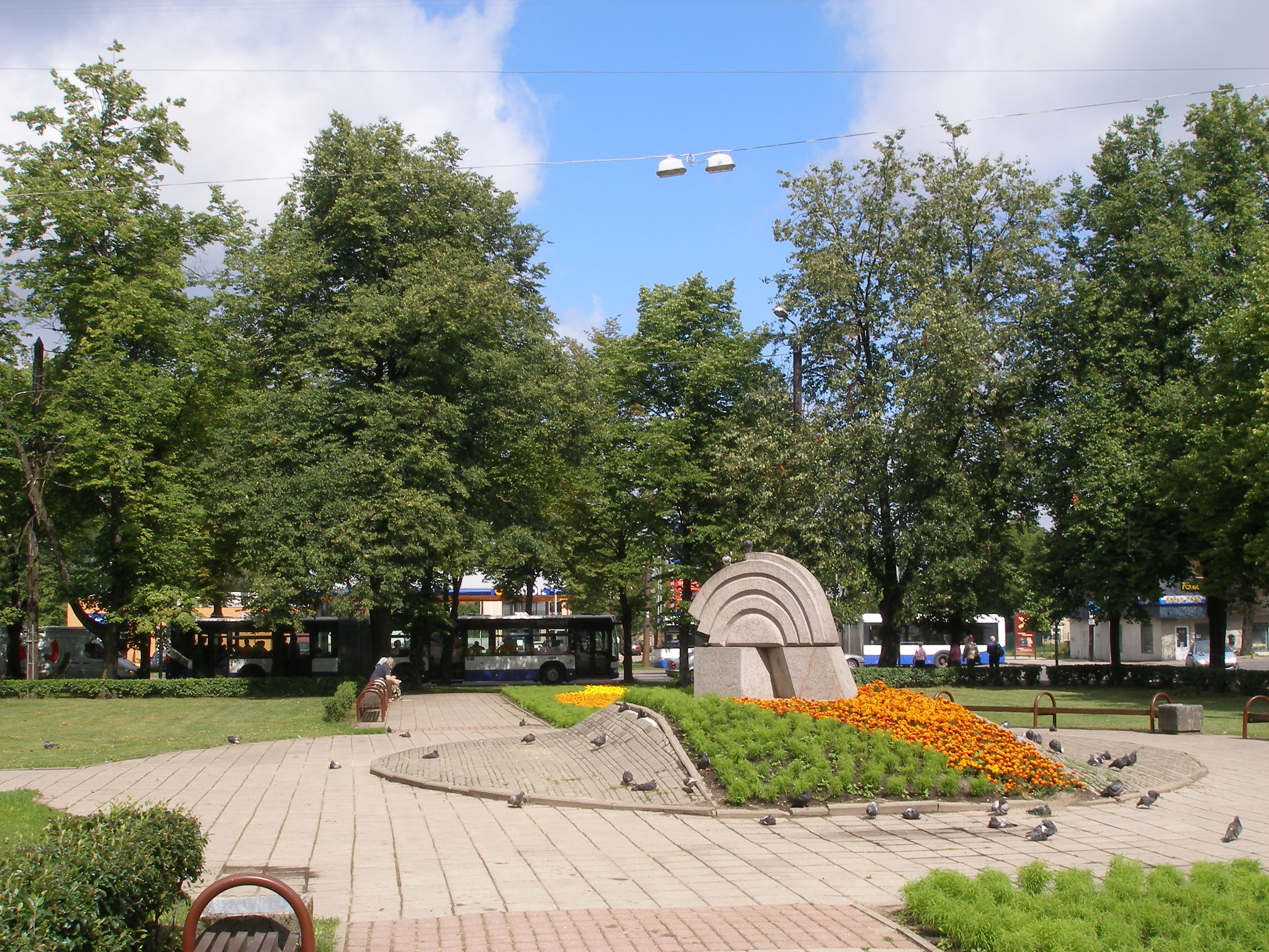 Zemitāna laukums no kinoteātra puses